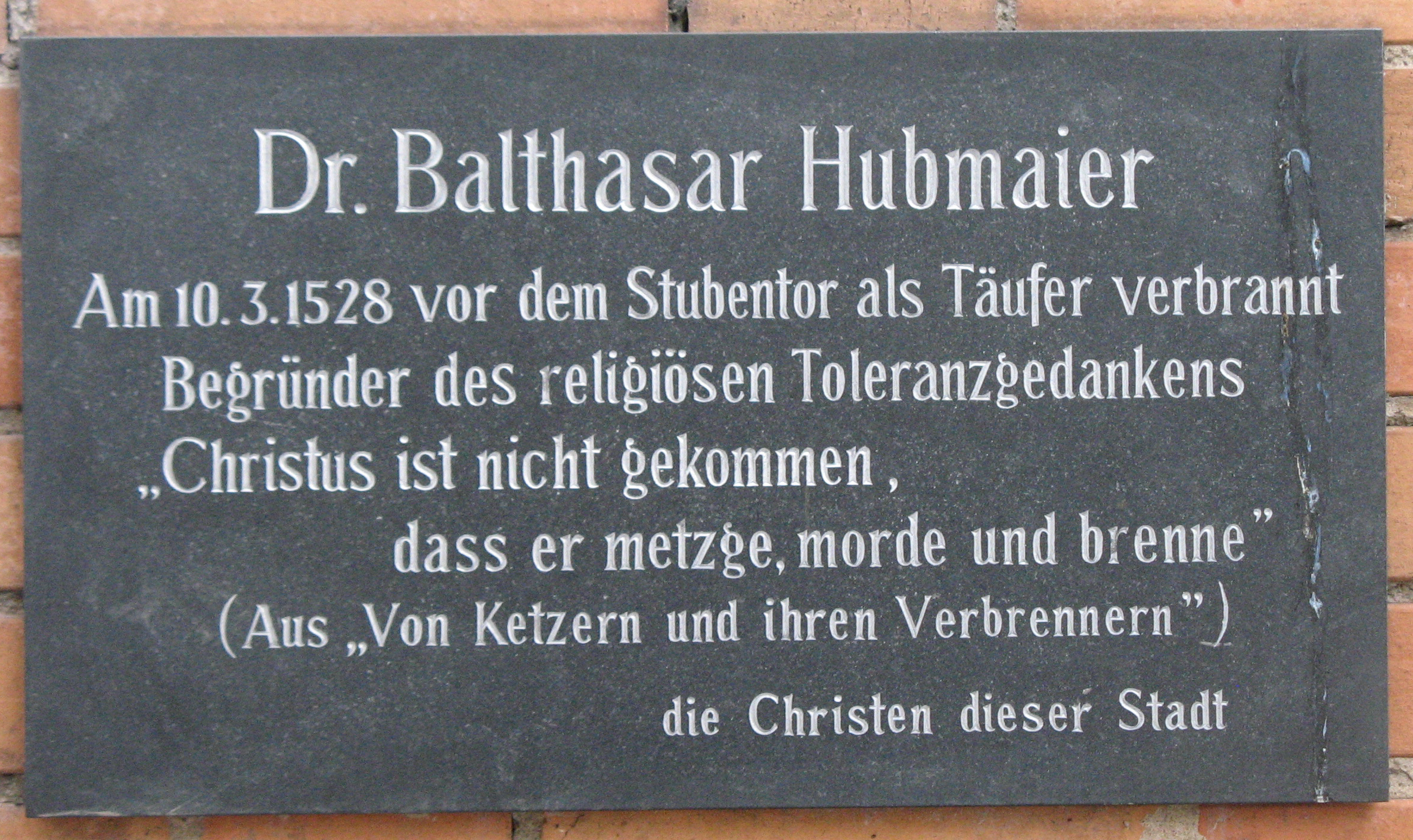 Gedenktafel für Balthasar Hubmaier, Dr.-Karl-Lueger-Platz, Wien-Innere Stadt